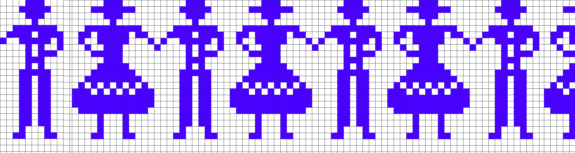 Motif tricot norvégien, frise de danseurs